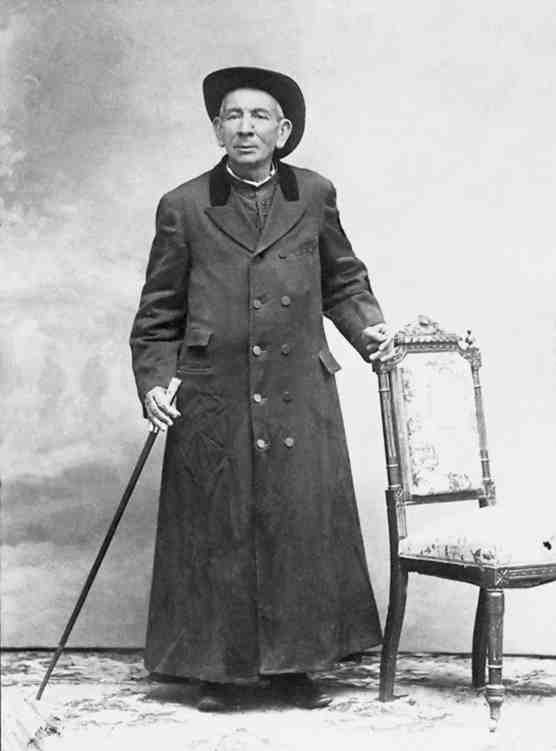 José Gabriel Brochero, sacerdote que realizó grandes obras de fomento de la población en la región de Tras las Sierras, Córdoba, argentina.